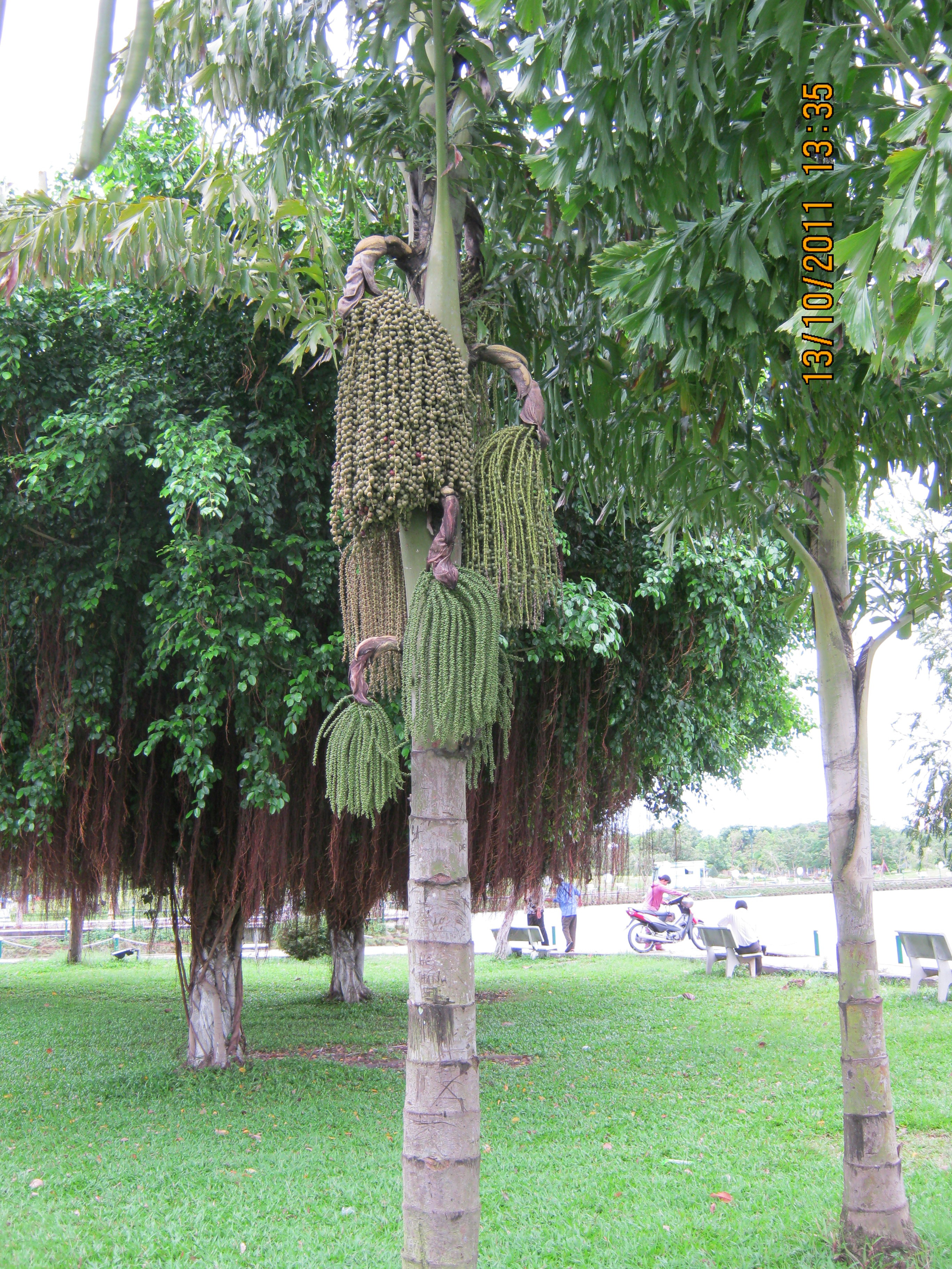 Cây đủng đỉnh là loại cây thuộc họ cau, mọc tự nhiên ở miền Nam Việt Nam, nhưng giờ thì đã khá hiếm.